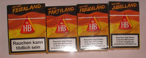 Aktionspackungen der HB-Sonderserie "Wir sind ...-Land" im Sommer 2008